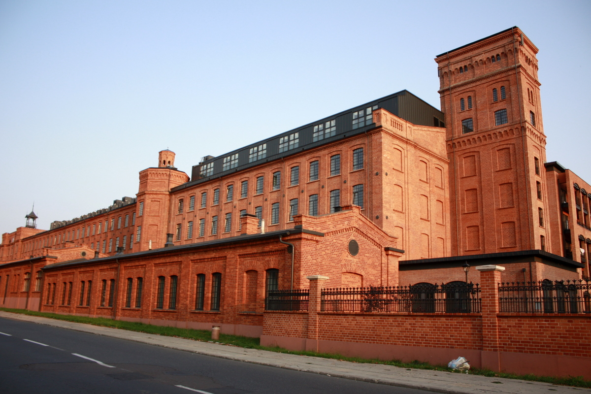 Łódź - przędzalnia w zespole zabudowy fabryczno-mieszkalnej Księży Młyn